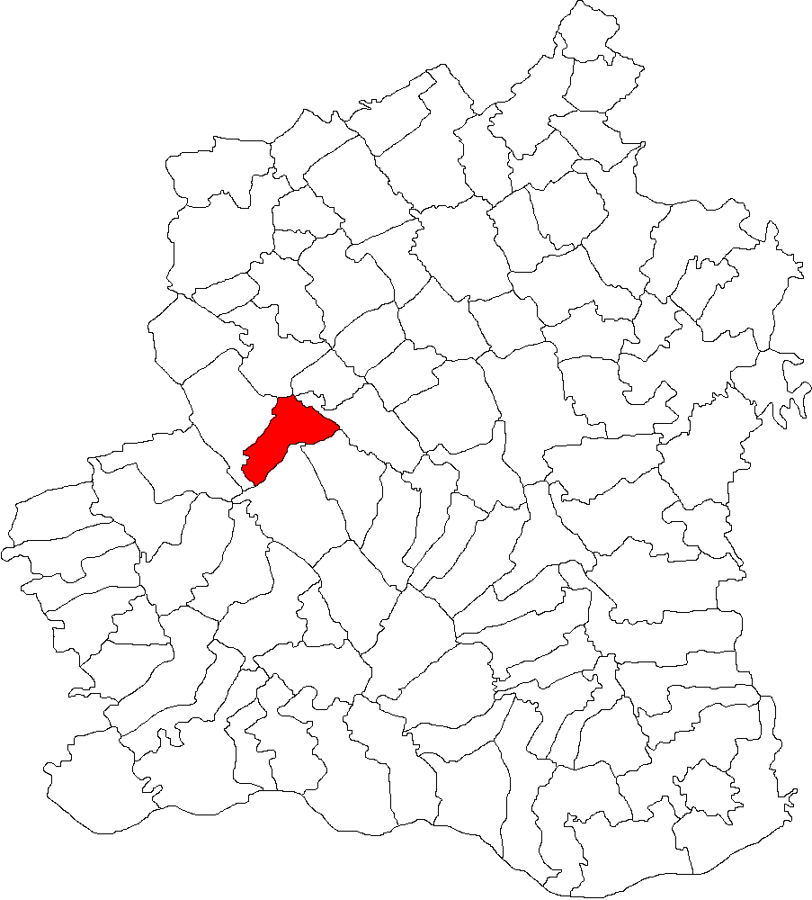 Categorie:Hărţi ale judeţului Teleorman